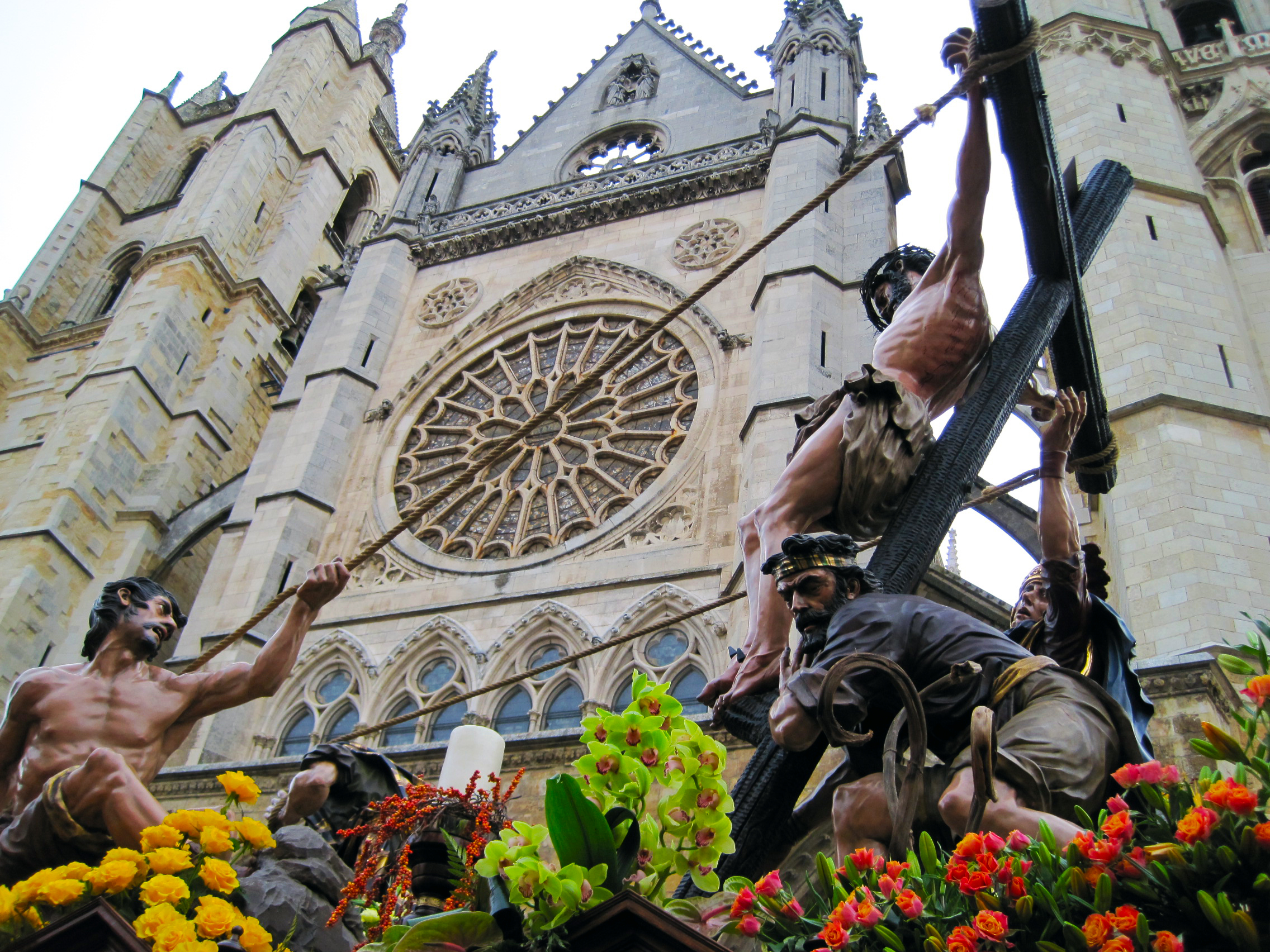 Paso de La Exaltación de la Cruz. Procesión de los Pasos. Cofradía del Dulce Nombre de Jesús Nazareno, León (España).